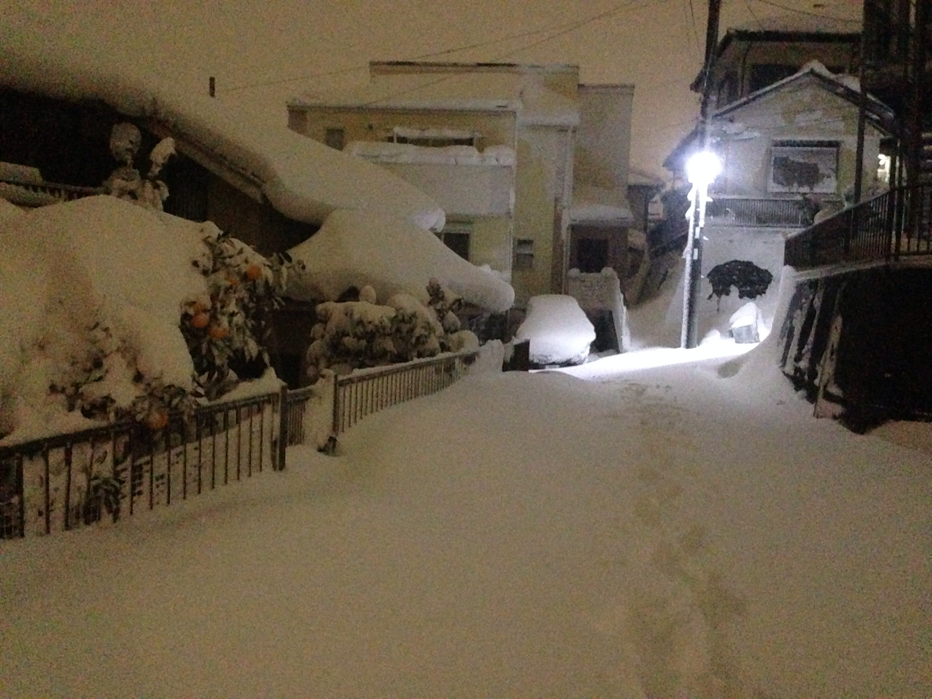 2014年2月14日の積雪、神奈川県横浜市旭区の住宅街にて。30-40センチ程の積雪があったものと思われる。